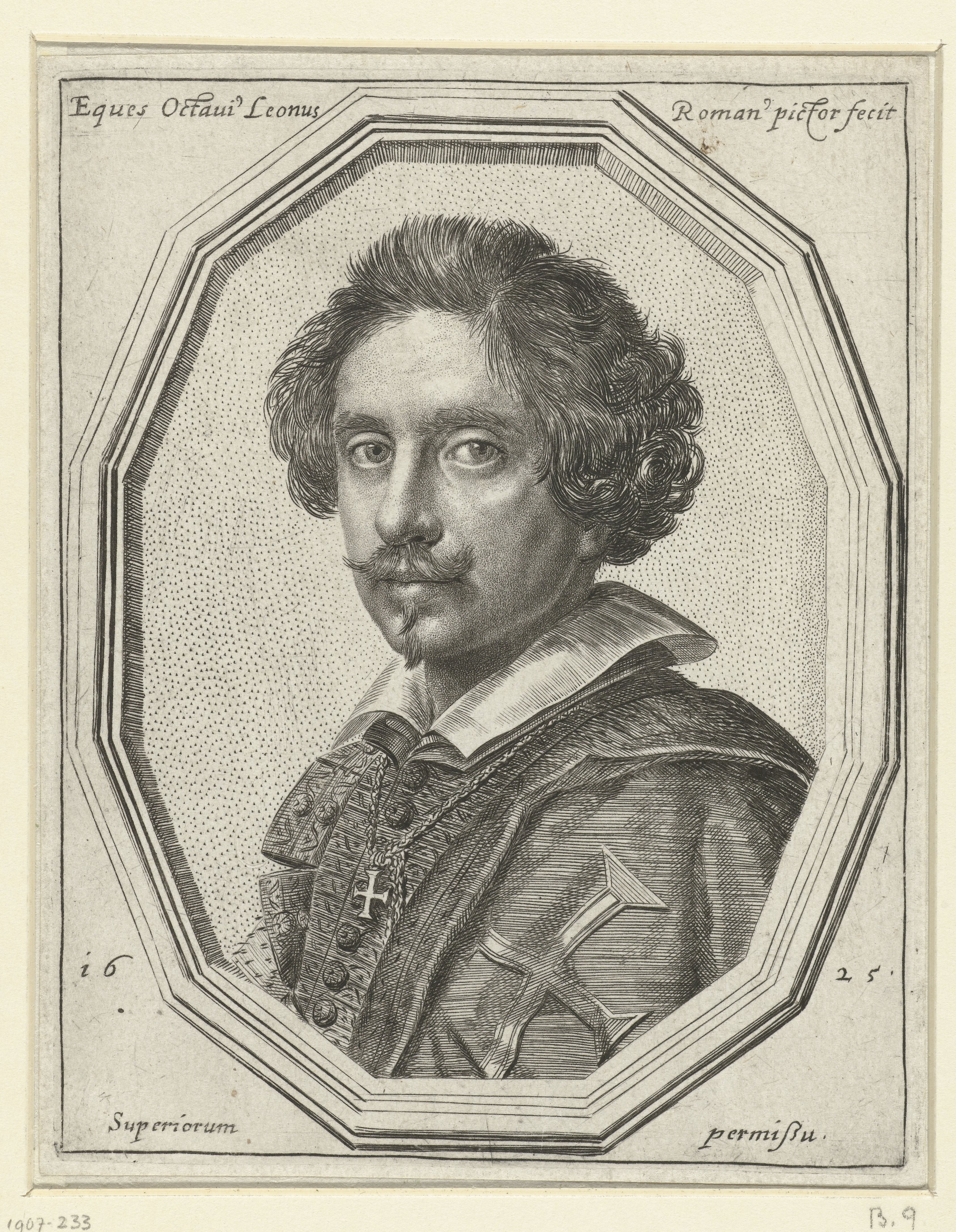 IdentificatieTitel(s): Portret van een manObjecttype: prent Objectnummer: RP-P-1907-233Catalogusreferentie: The Illustrated Bartsch 9Opschriften / Merken: verzamelaarsmerk, verso midden, gestempeld: Lugt 2228Omschrijving: Portret van een manin een twaalfhoekige lijst. Hij draagt een kruis van de Orde van Christus op zijn mantel en aan zijn ketting.VervaardigingVervaardiger: prentmaker: Ottavio Mario Leoni (vermeld op object)naar eigen ontwerp van: Ottavio Mario LeoniPlaats vervaardiging: ItaliëDatering: 1625Fysieke kenmerken: ets en stippeletsMateriaal: papier Techniek: etsenAfmetingen: plaatrand: h 143 mm × b 111 mmOnderwerpWat: portrait, self-portrait of artistVerwerving en rechtenVerwerving: aankoop 1905Copyright: Publiek domein